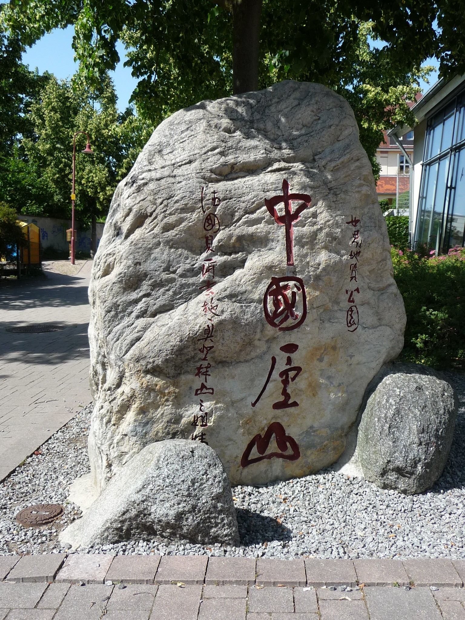 Lorsch